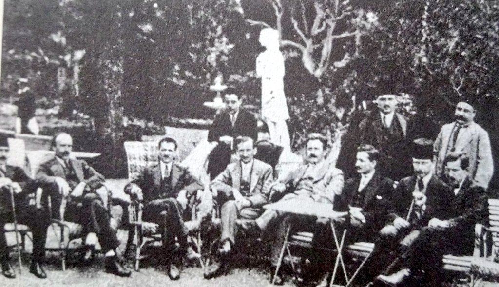 Büyükada Yat Kulübü. Ayaktakiler soldan sağa Kazım Şinasi, Yahya Kemal, Ziya Gökalp. Oturanlar soldan sağa Nihat Bey, Küçük Talat, Fuat Köprülü, Necmettin Sadık, Bahaeddin Şakir, Refik Halid, Falih Rıfkı, Fazıl Ahmet.